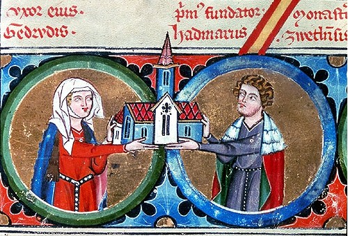 Hadmar I and Gertrude von Kuering